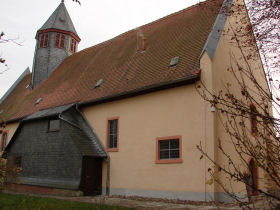 Ev. Pfarrkirche St. Martin, Petterweil